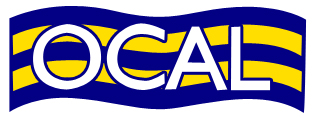 Logo de la Organización Canalla para América Latina